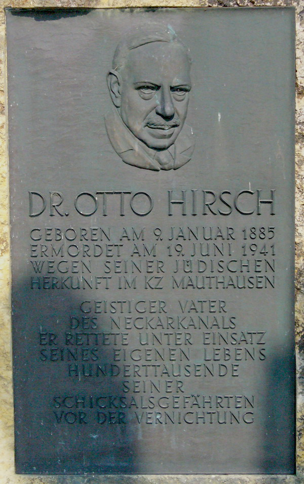 Stuttgart-Hedelfingen Otto Hirsch Gedenkplatte